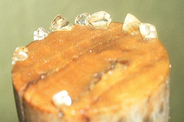 Weinkristalle am Korken (Kristalle und Korken eines 1979er Weißweines aus Österreich "St.Margarethener Auslese")